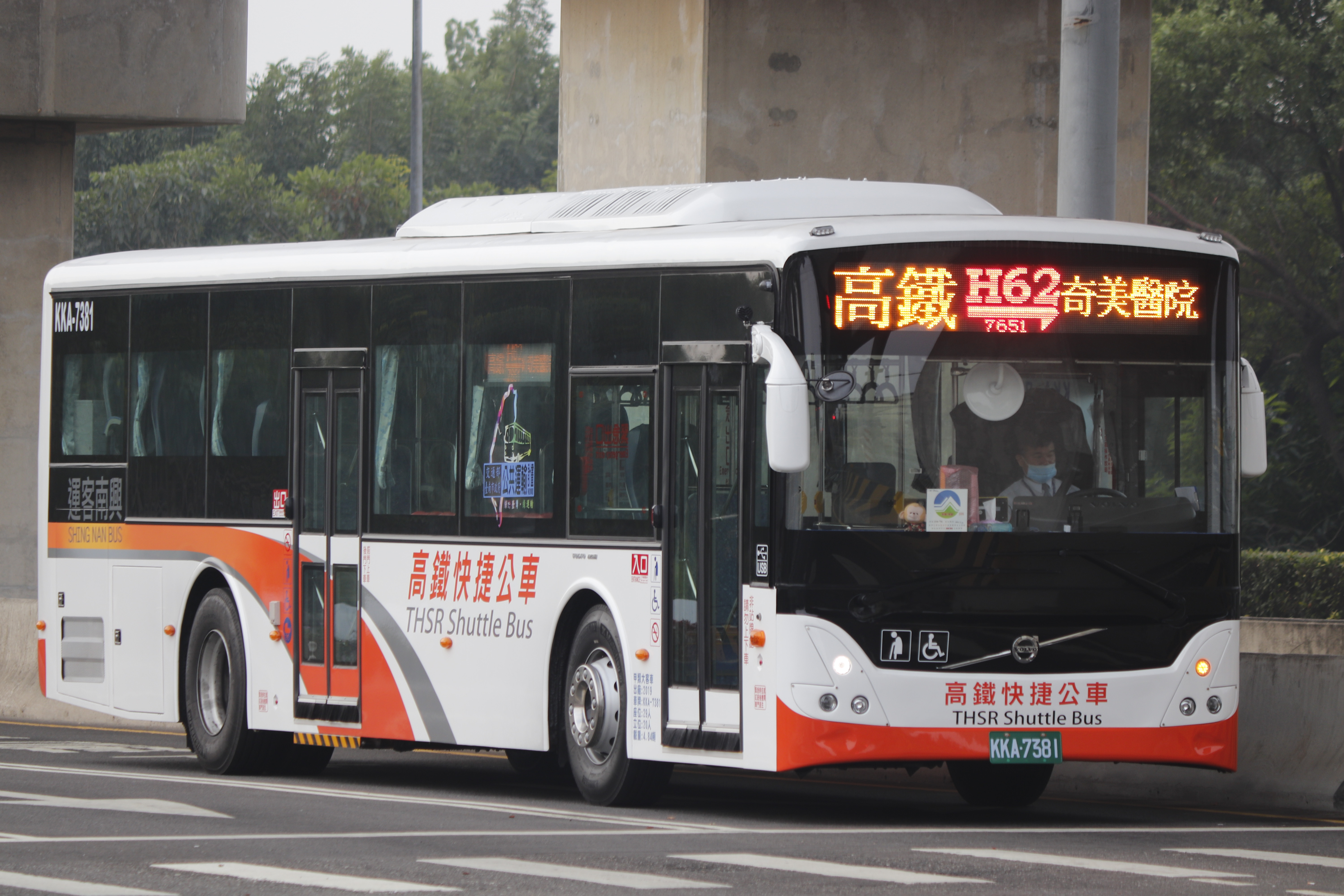 興南客運 KKA-7381